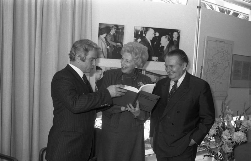 Sportwissenschaftler Prof. Dr. Horst Überhorst stellt das sechsbändige Werk "Geschichte der Leibesübung" in der Landesvertretung von Nordrhein-Westfalen vor.